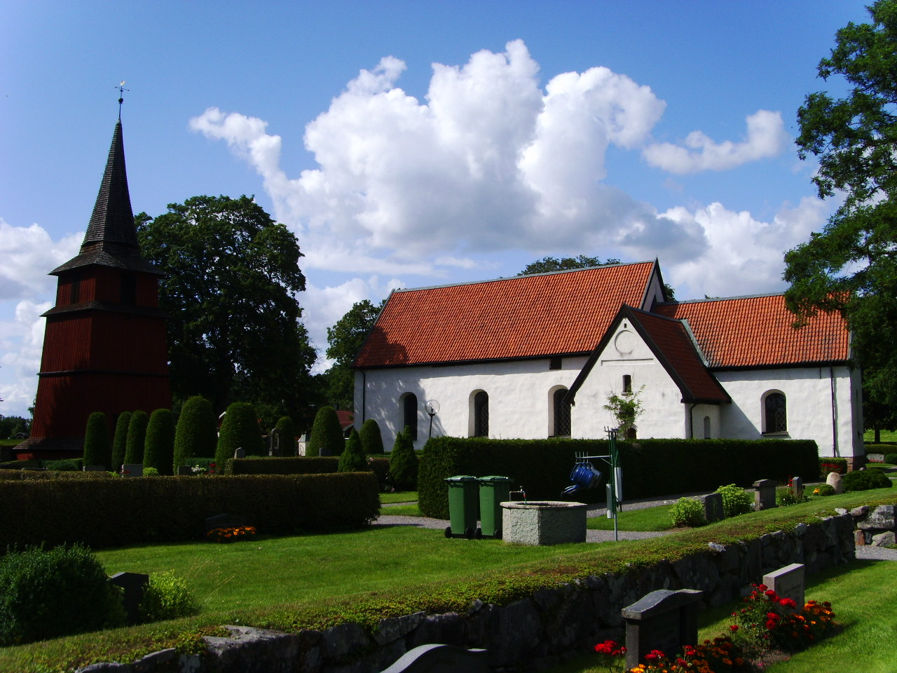 Skönberga kyrka (södra fasaden) och klockstapeln.